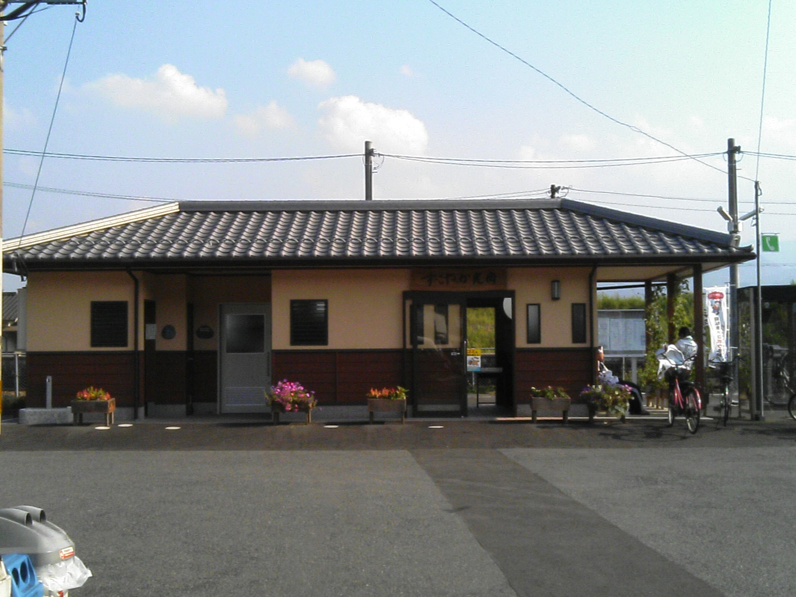 新駅舎（2007年7月28日撮影） 撮影者：葉月裕一